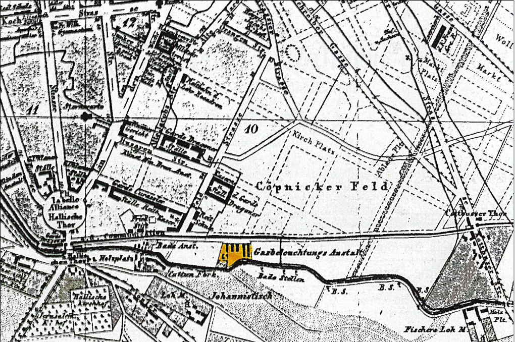 Grundriss von Berlin, C. F. Wolff, 1840; markiert Lage der ersten englischen Gasbeleuchtungsanstalt, 1826